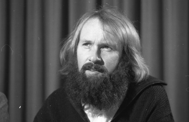 07.01.1983 Pressekonferenz der Grünen (Live-Porträts) mit Otto Schily, Lukas Beckmann, Hermann Schulz im Hotel Tulpenfeld.